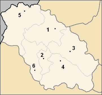 Sujet : carte des obchtini (municipalités) de l'oblast de Pernik, en Bulgarie Auteurs : Потребител:Ljubo (Любомир Таушанов = Lyoubomir Taouchanov), pour la version originale en bulgare, Utilisateur:Hégésippe Cormier, pour l'adaptation française (repères chiffrés) Source : Картинка:Pernik Oblast map.PNG (22 mai 2005) Licence